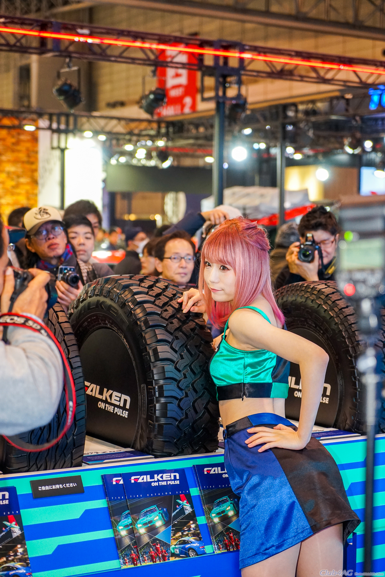 Tokyo Auto Salon 2019